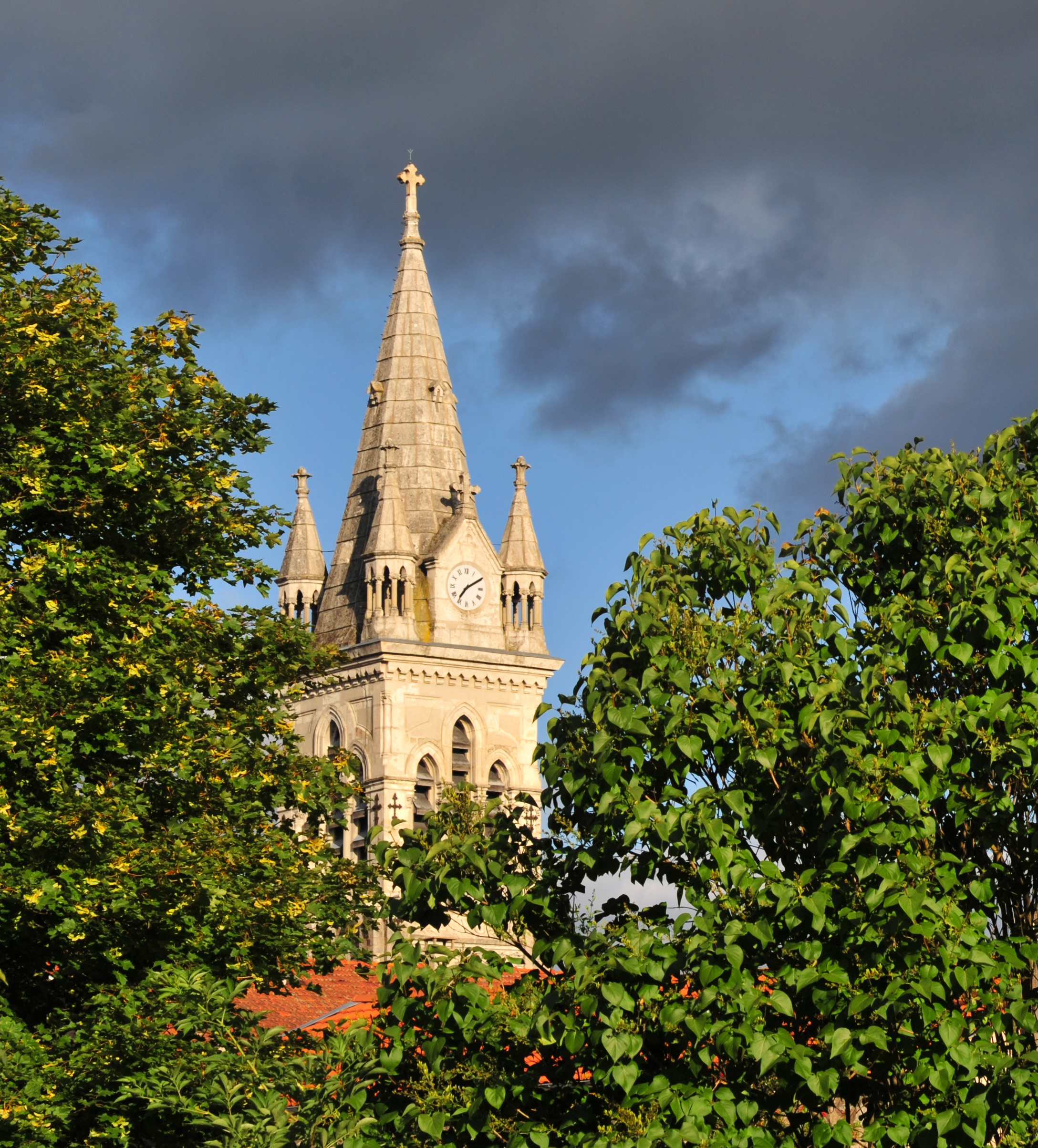 Clocher de la catédrale St-Saturnin (village de Marlhes, département de la Loire), surnommée "La Cathédrale des Plateaux", vu depuis un jardin